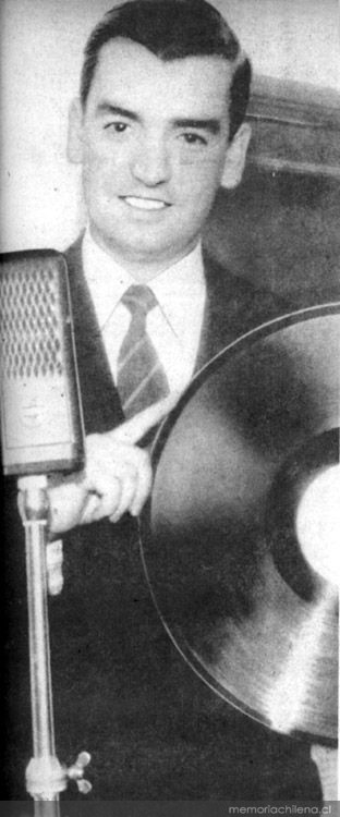 En un estudio de Radio